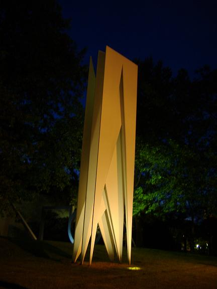 Skulptur von Ben Muthofer vor dem Museum für Konkrete Kunst in Ingolstadt. ?Germany